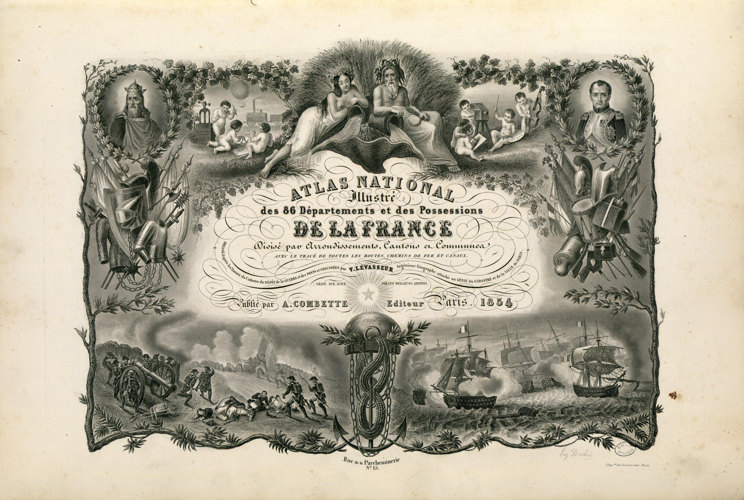 Titre complet du recueil : Atlas national illustré des 86 Départements et des Possessions de la France divisé par Arrondissements, Cantons et Communes avec le tracé de toutes les routes, chemins de fer et canaux. Dressé d'après les Travaux du Cadastre du Dépôt de la Guerre et des Ponts et Chaussées par V. Levasseur, Ingénieur Géographe attaché au Génie du Cadastre et de la Ville de Paris. Gravé sur acier par les meilleurs artistes. Imprimerie de Lemercier à Paris ou imprimerie Dupuich à St Jean-de-Latran. Page de titre et 100 pl. en n. et b. et en coul. dont un tableau statistique et 2 cartes dépliantes. Ancely, René (1876 - 1966). Possesseur